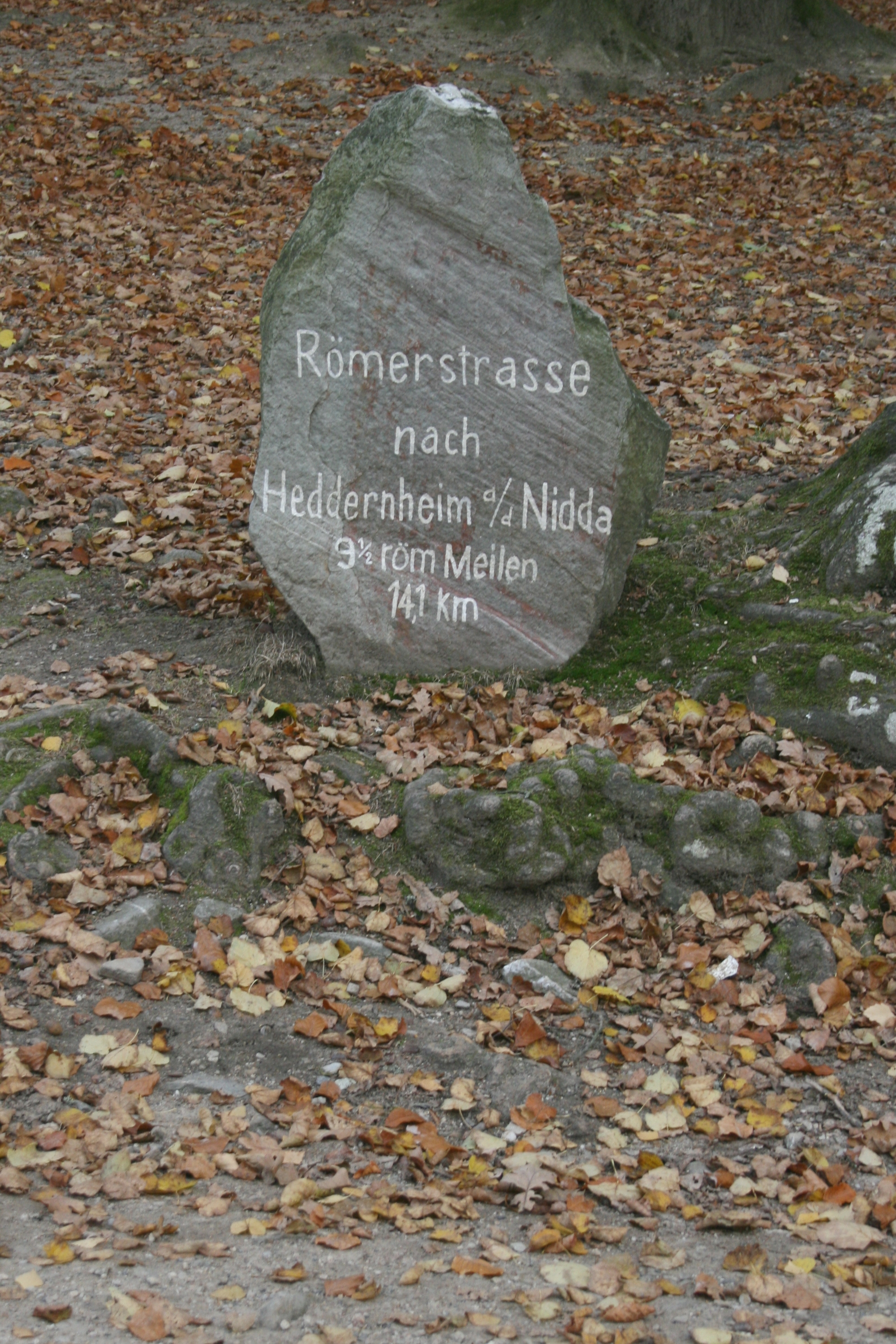 Hinweistafel auf die Römerstraße Nida (Heddernheim) zum Kastell Saalburg vor dem Kastelltor.